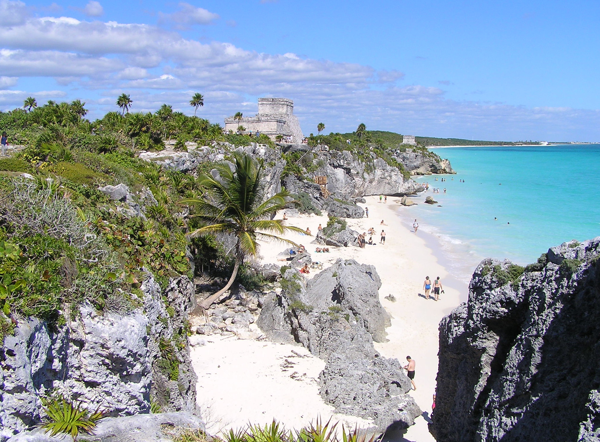 Beach at Tulum Ruins